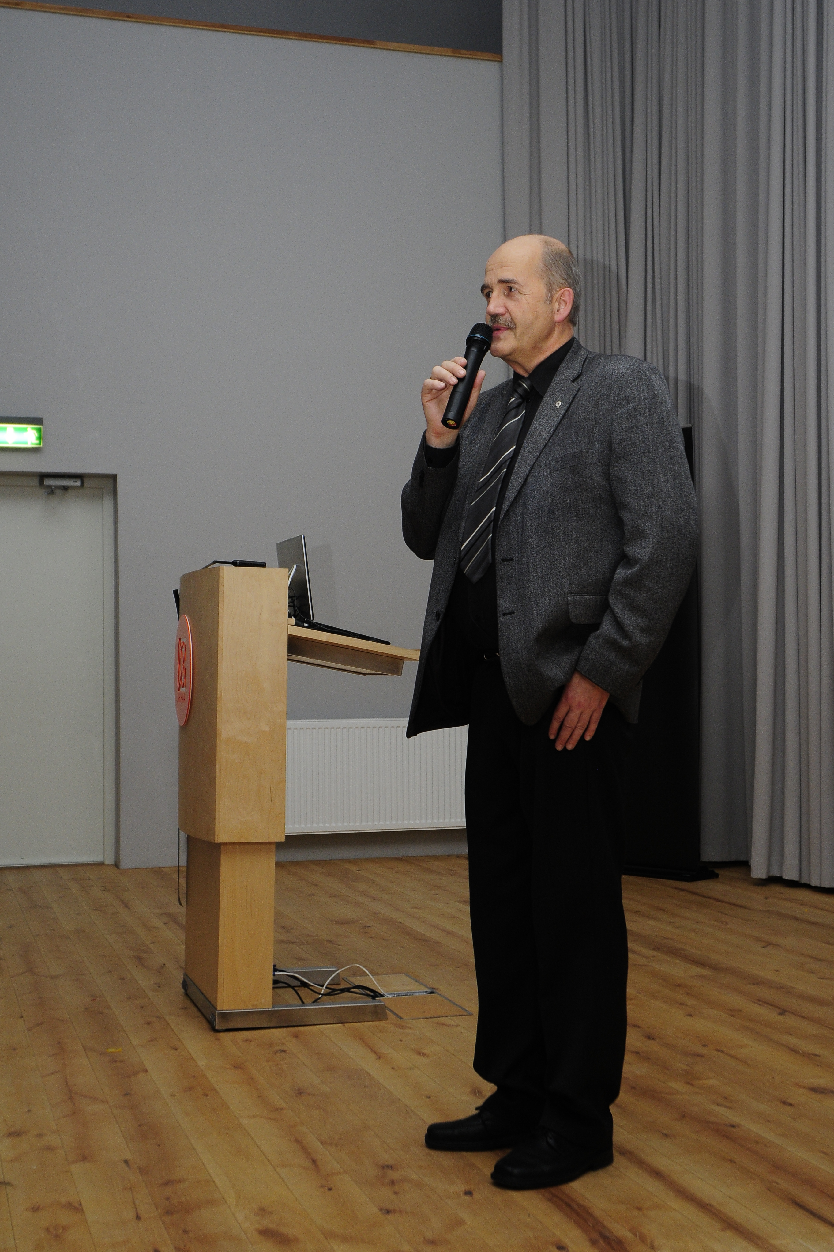 Teadusfoto 2012 lõpuüritus. Kõneleb Jaak Kikas.